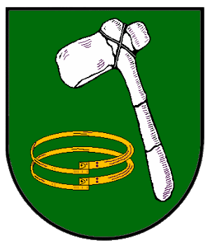 Coat of arms Tarmstedt, Wappen der Gemeinde Tarmstedt